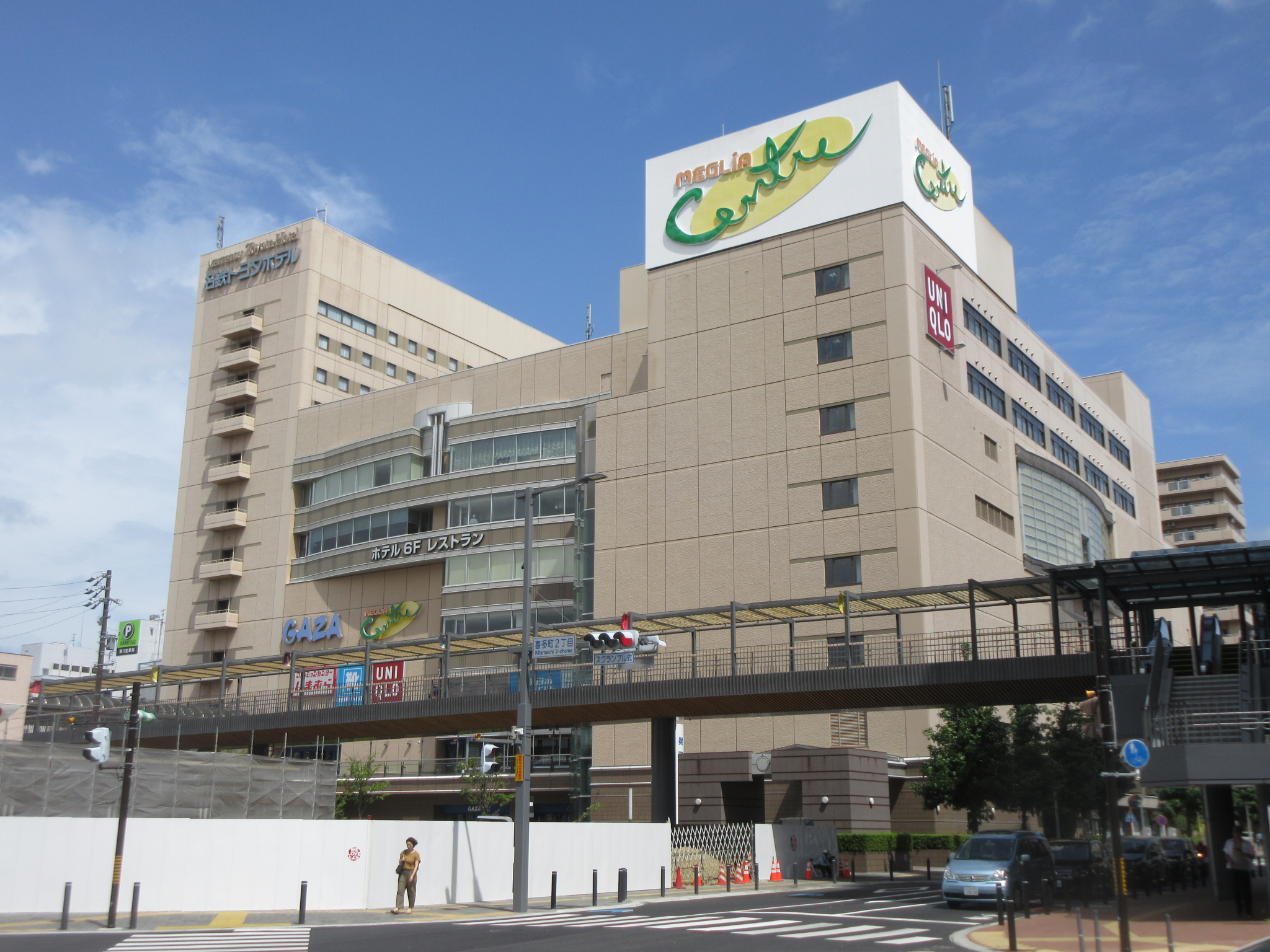 ギャザ（豊田市喜多町）